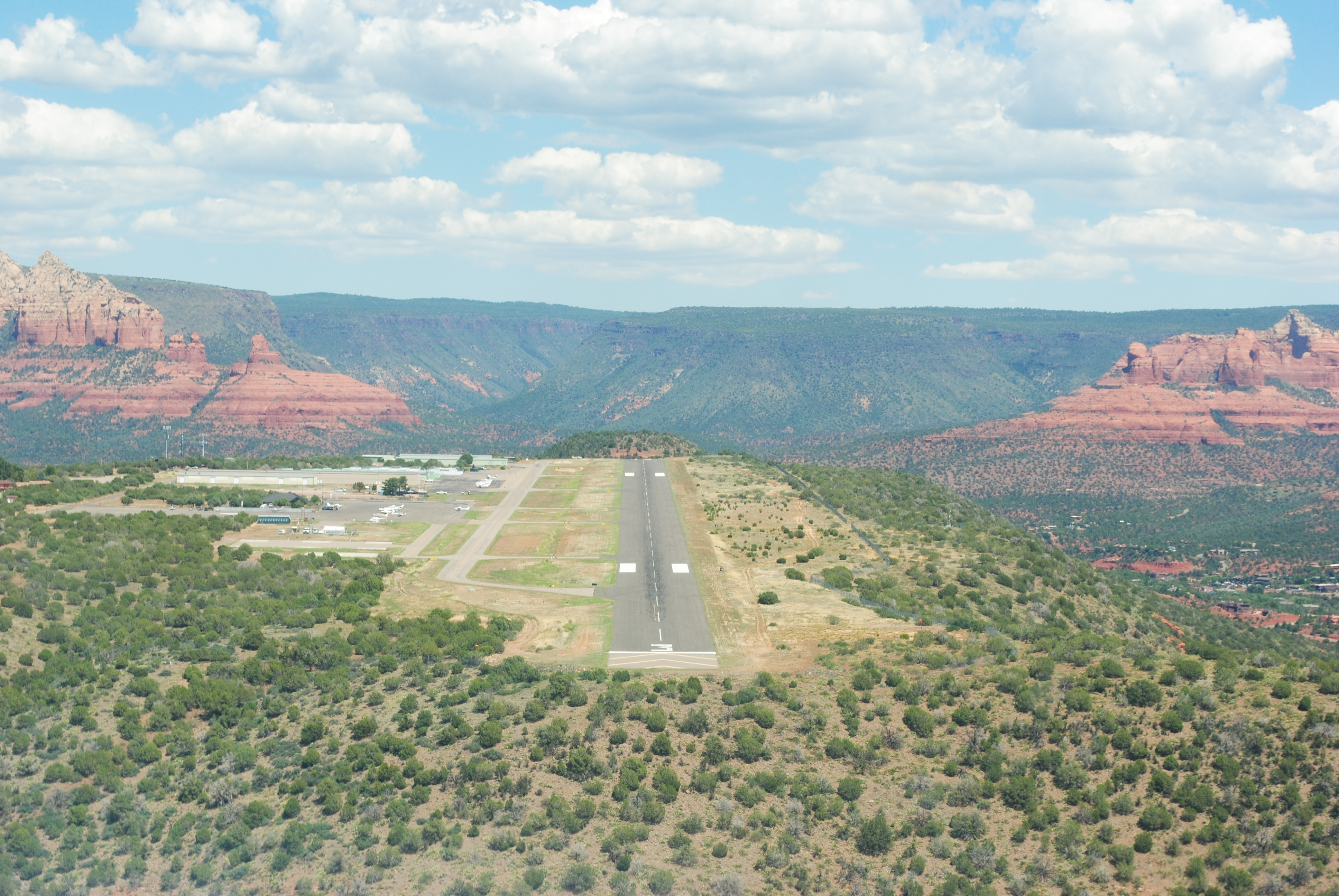 Sedona Airpot